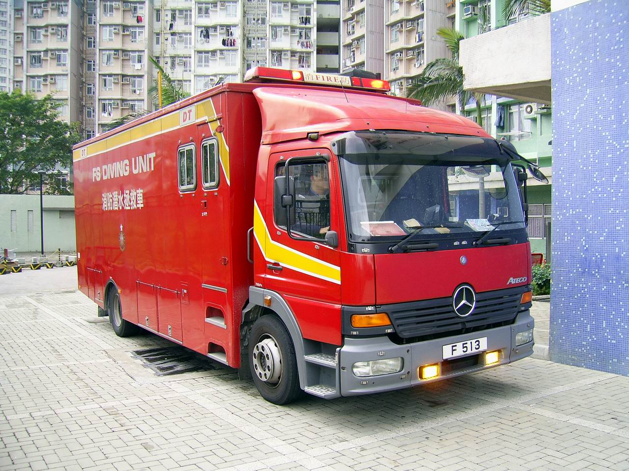 消Mercedes-Benz Atego fire engine防處潛水裝備供應車